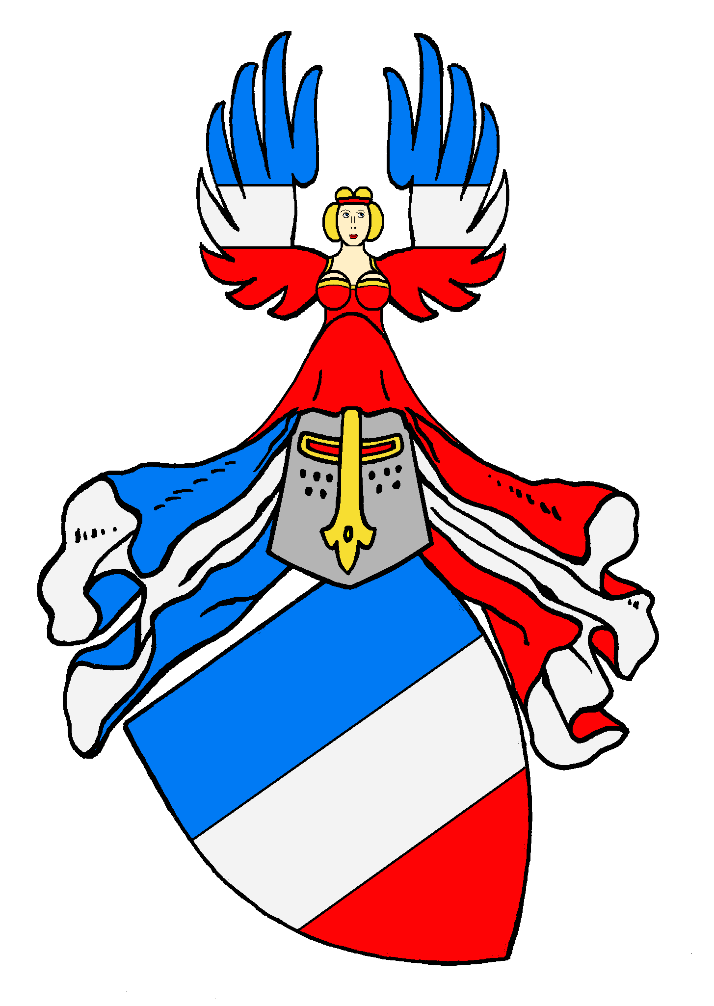 Wappen der kurpfälzischen von Flersheim, mitsamt der Nebenlinie von Flersheim genannt Monsheimer (von Flörsheim genannt Montzheimer)